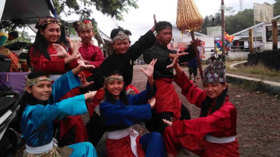 pose setelah upacara di nikahan warga jampang tengah